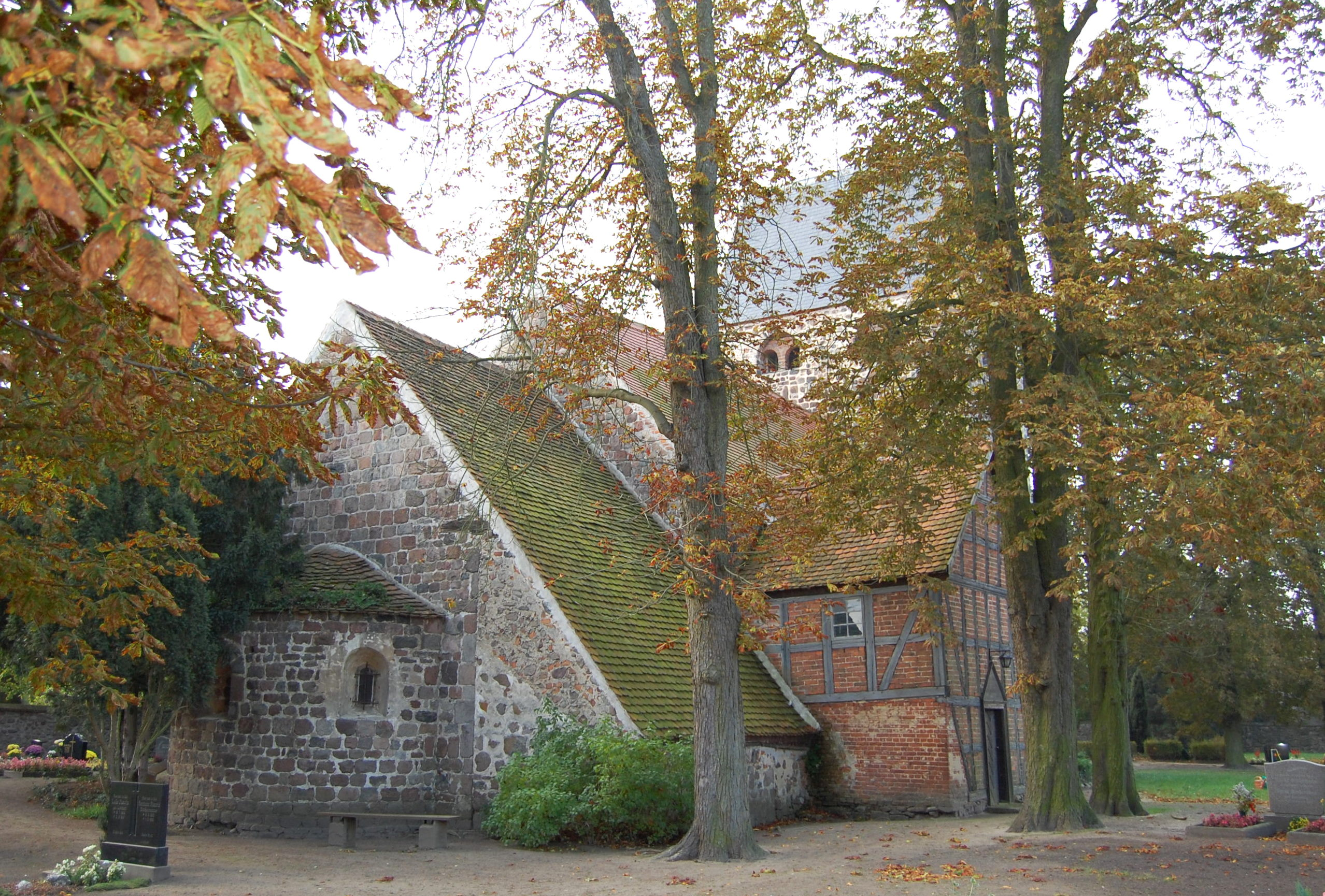 Dorfkirche Insel, Blick auf Apsis und Schiff